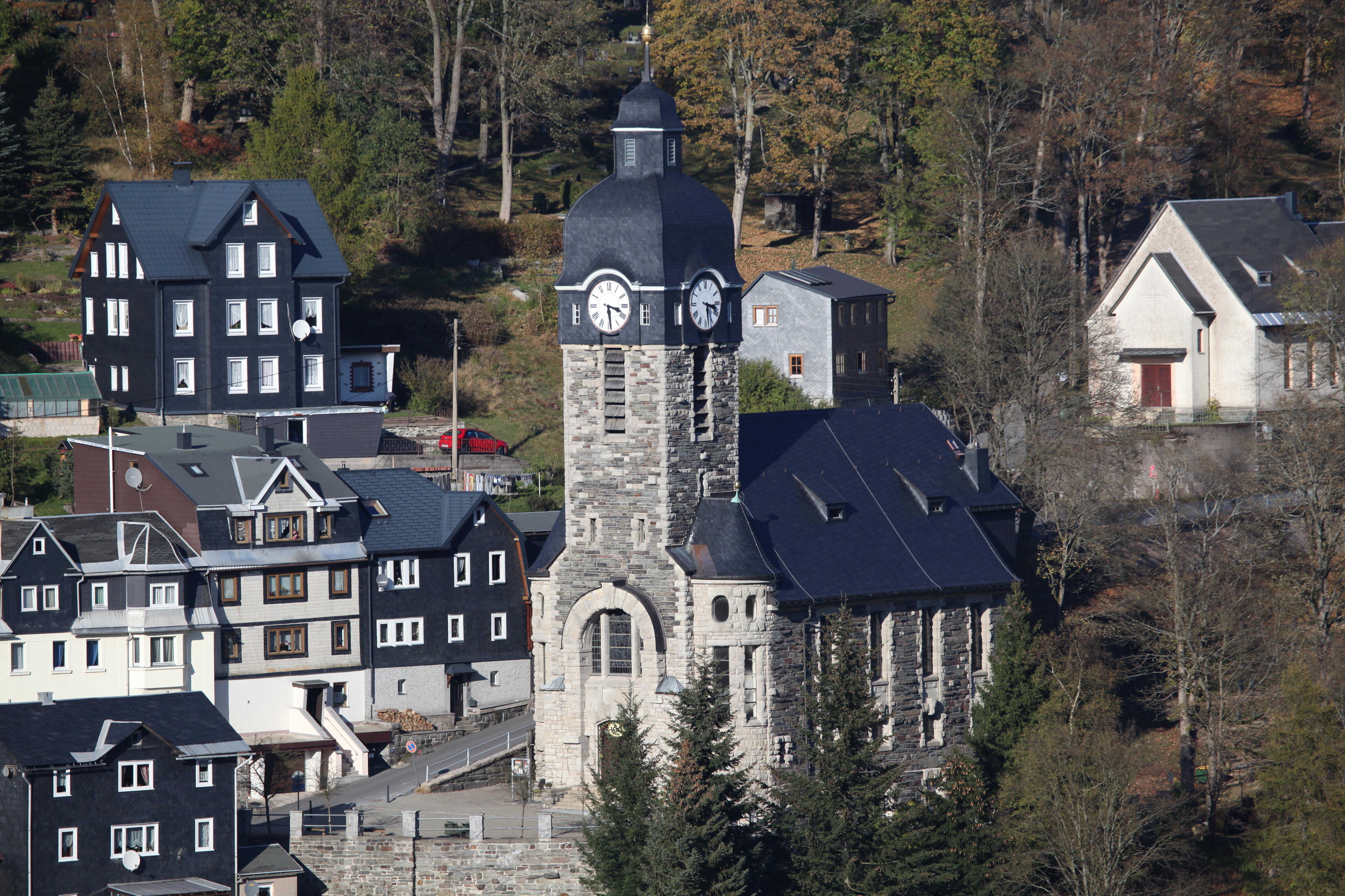 Evangelisch-Lutherische Kirche in Lauscha, Jugendstil, Saalkirche mit Walmdach, 1911, von Julius Zeißig